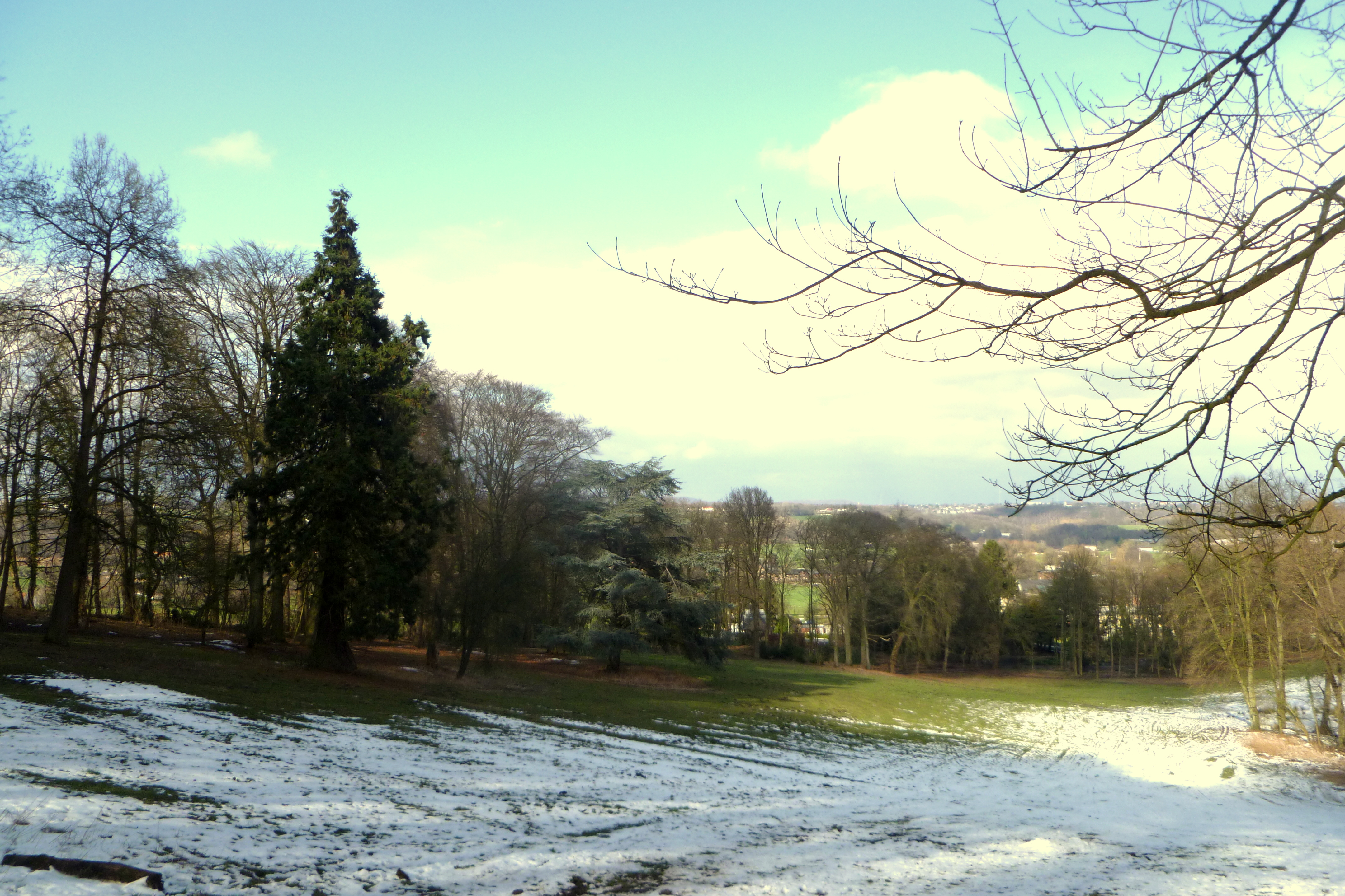 Wiesenhang im Müschpark vom Lousberg aus gesehen